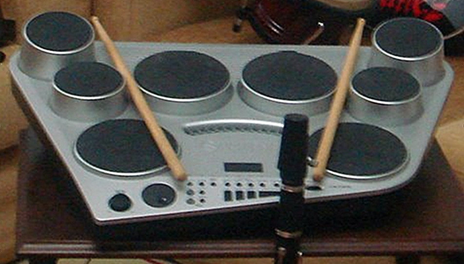 Yamaha DD-65 Digital Drum Kit